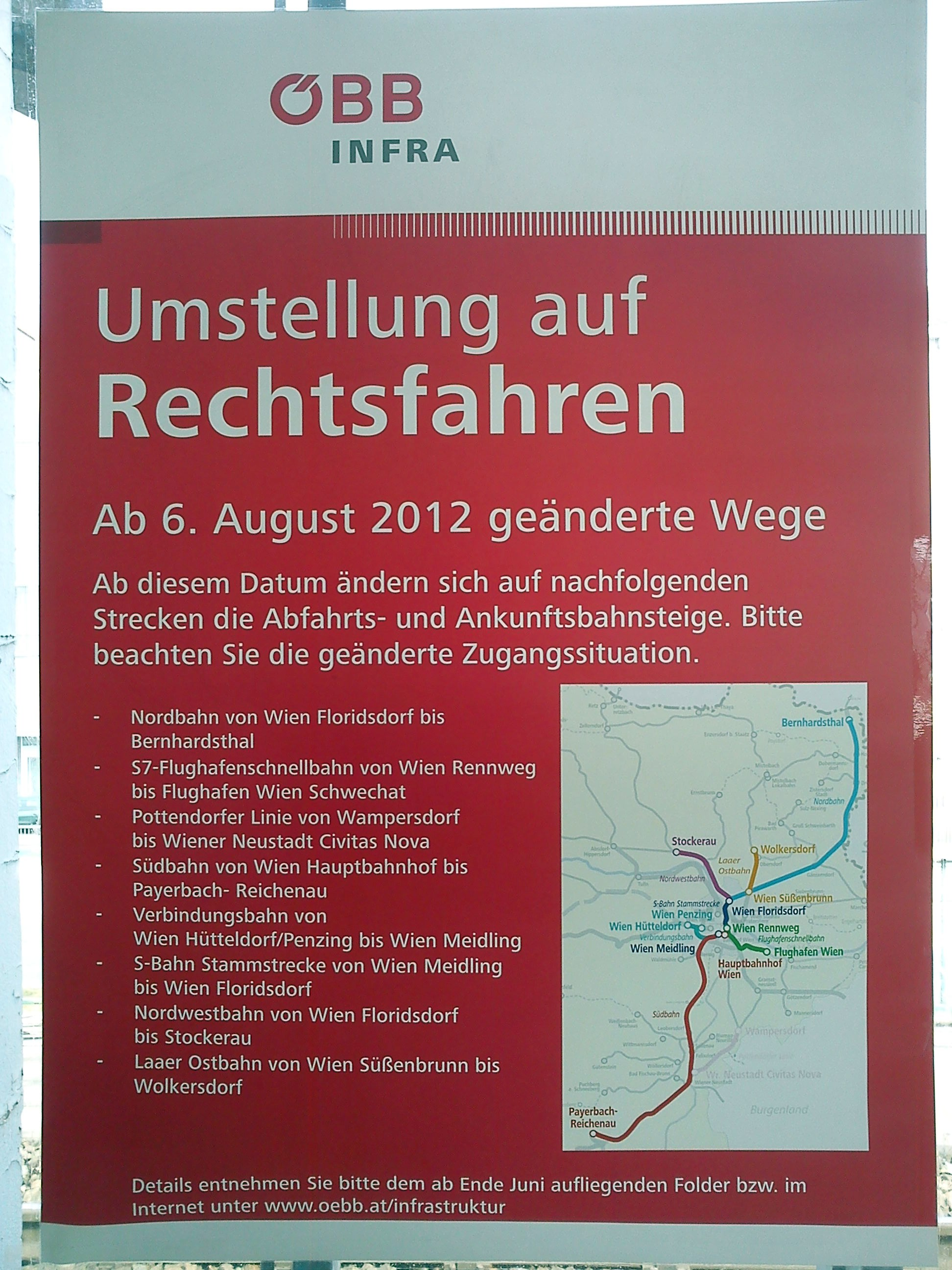 Bekanntmachung im Wiener Raum, dass die restlichen Eisenbahnstrecken, die noch als Erbe der k.u.k.-Zeit im Regelfall links befahren werden werden, ab dem 6. August 2012 auf Rechtsfahrbetrieb umgestellt werden. Die Plakate hingen auf allen Bahnhöfen in der Region.